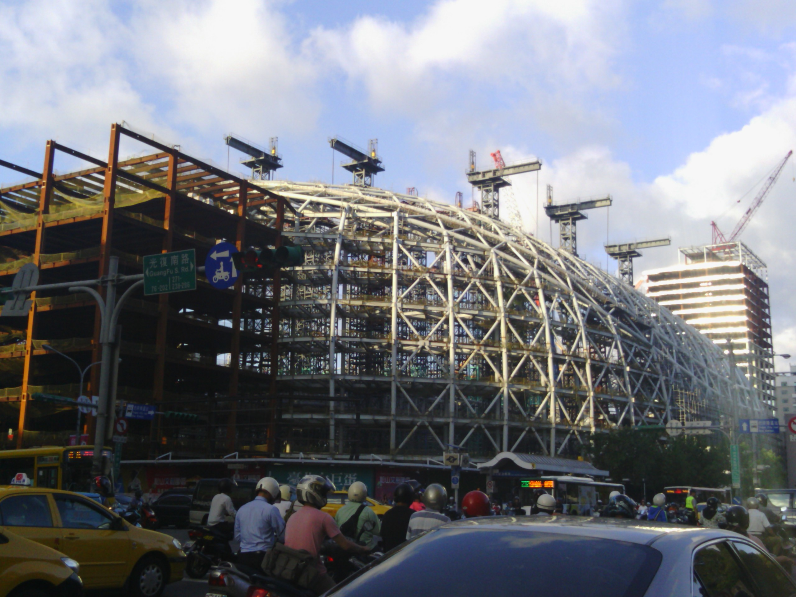 中文（台灣）: 臺北大巨蛋建築工地。